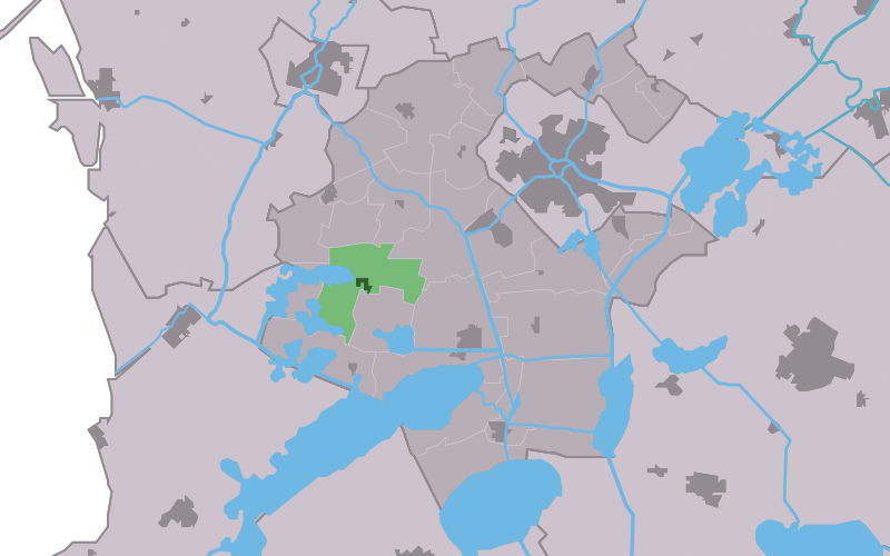 Kaartsje fan himrik fan Aldegea